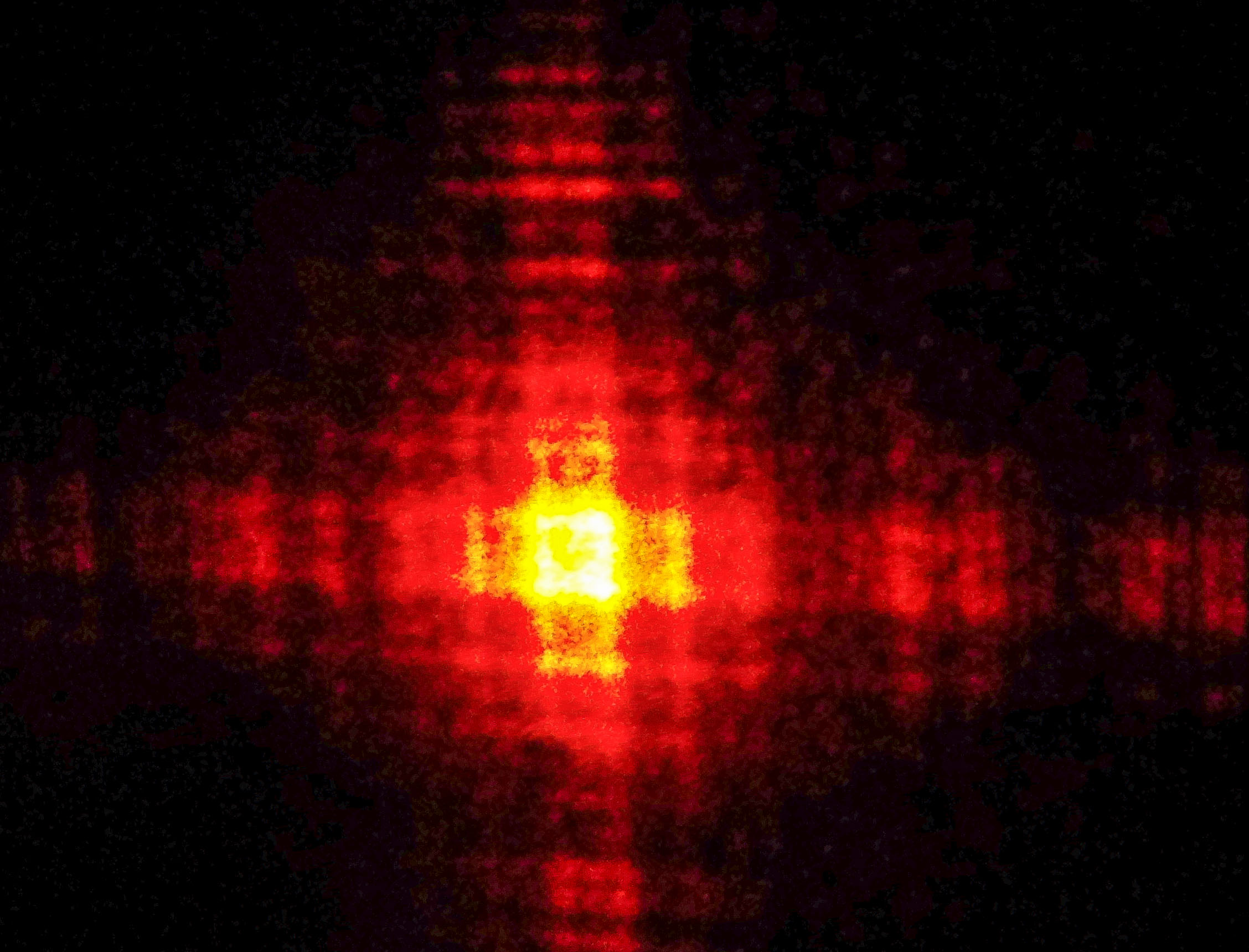 Láser difractado usando una lente y una rendija en forma de cuadro. Foto tomada en el laboratorio de óptica de la facultad de ciencias de la unam.